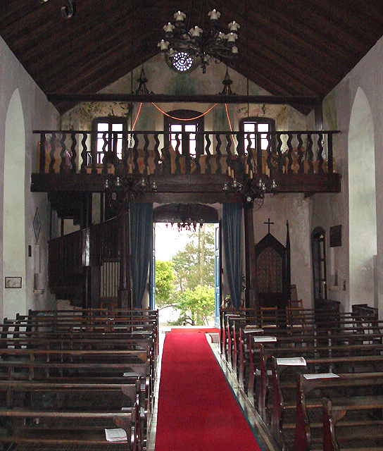 Interior da Igreja de São Domingos, Torres, Brasil. Vista da entrada, nave e coro